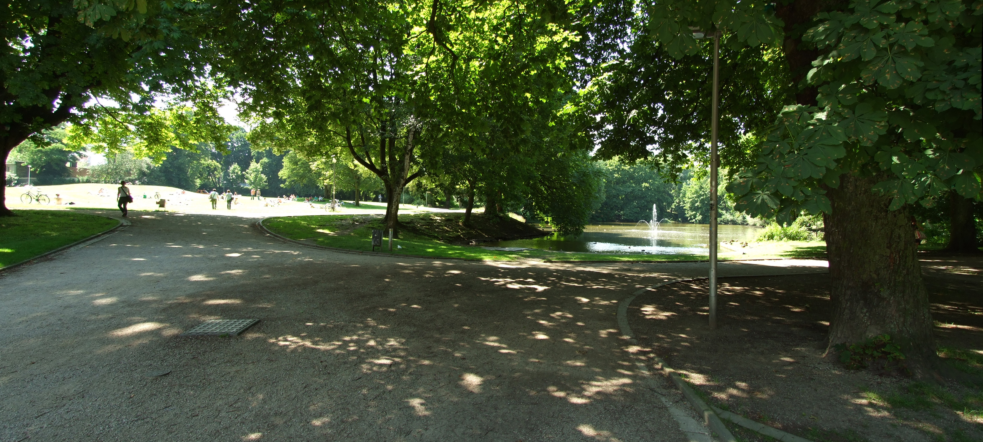 Westpark in Aachen, Germanylinks Liegewiese, rechts Teich